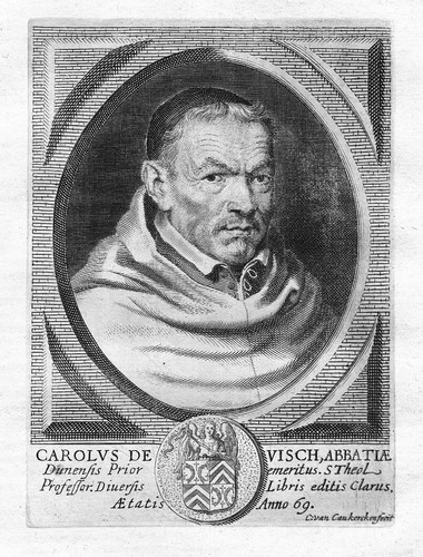 Charles de Visch, Carolus de Visch, Karl de Visch (1596-1666) war Zisterzienser der Abtei Dünen [Les Dunes/Ten Duinen), Ordenshistoriker, Prediger und Theologe.